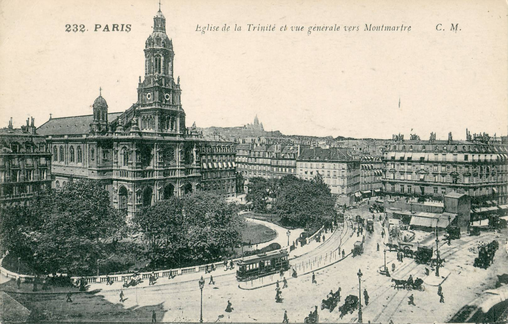 Carte postale ancienne éditée par CM, N°232Paris : L'église de la Trinité et vue générale vers MontmartreOn distingue au milieu de la photo le terminus du Tramway Enghien - Trinité